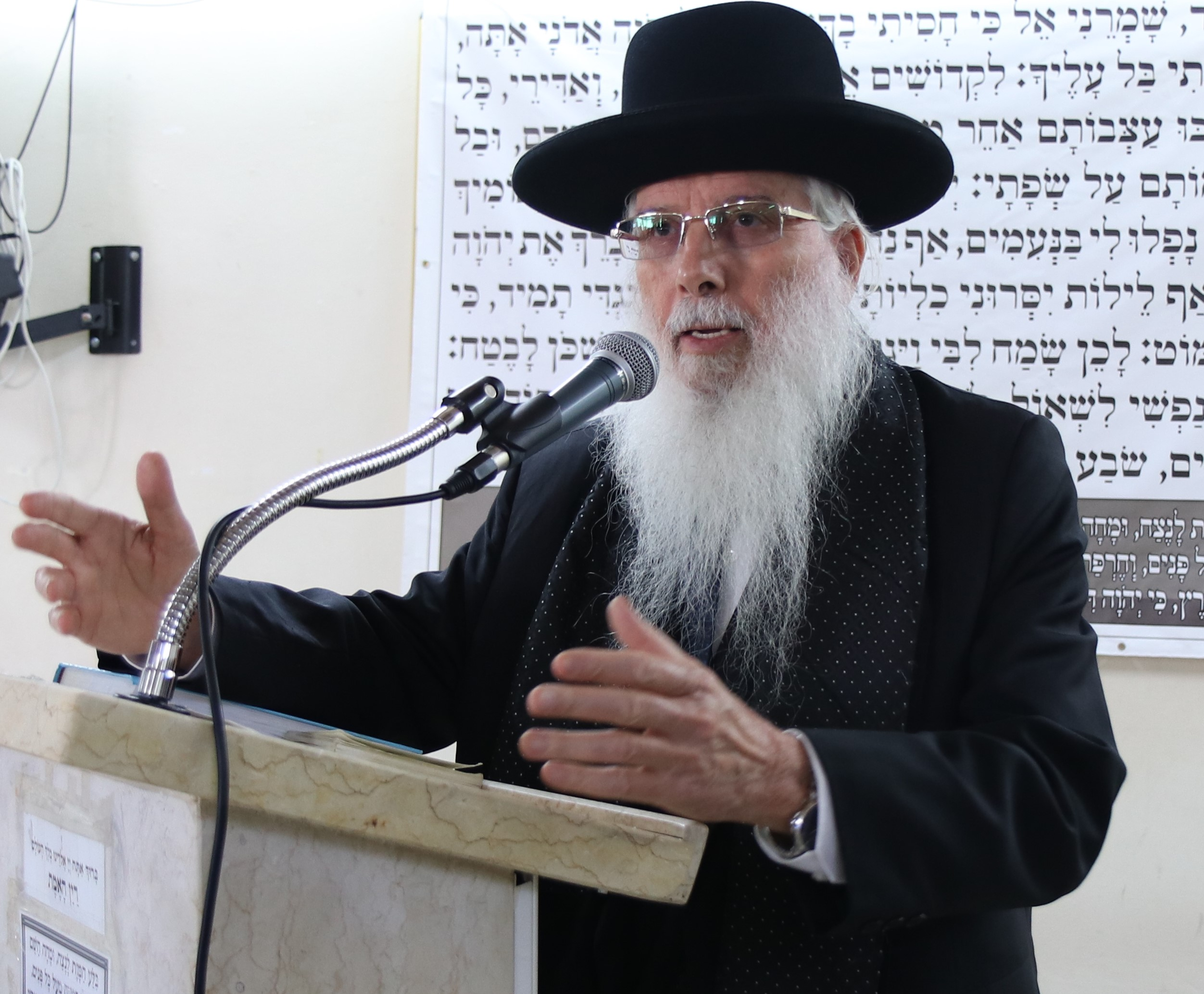 הרב יחיאל אבוחצירא מספיד קרוב משפחה בבית ההלוויות שמגר בירושלים, פברואר 2019. קרדיט: "רווח הפקות"